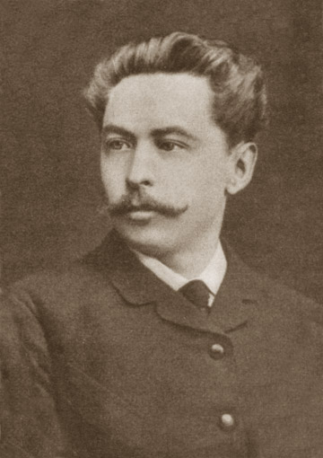 Alexei Stepanovich Stepanov, photography